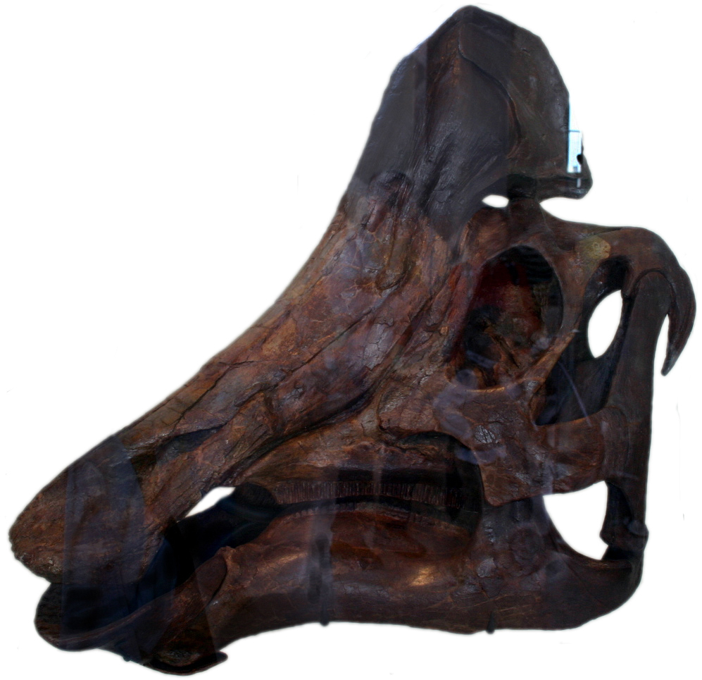 Hypacrosaurus skull, AMNH.